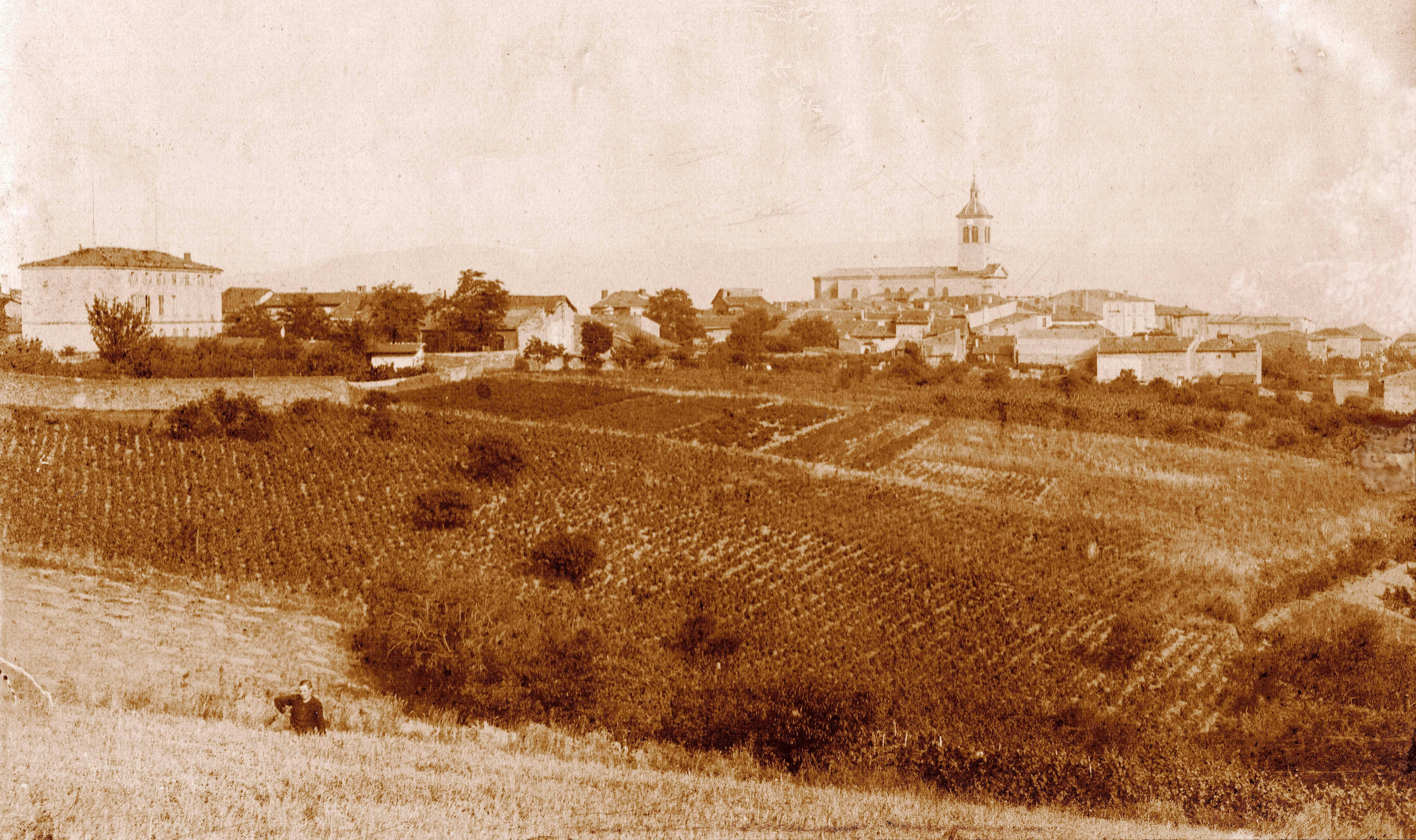 Saint-Genis-Terrenoire (Génilac , Loire : département, France) . Photographie sépia, vue générale depuis le le nord-ouest